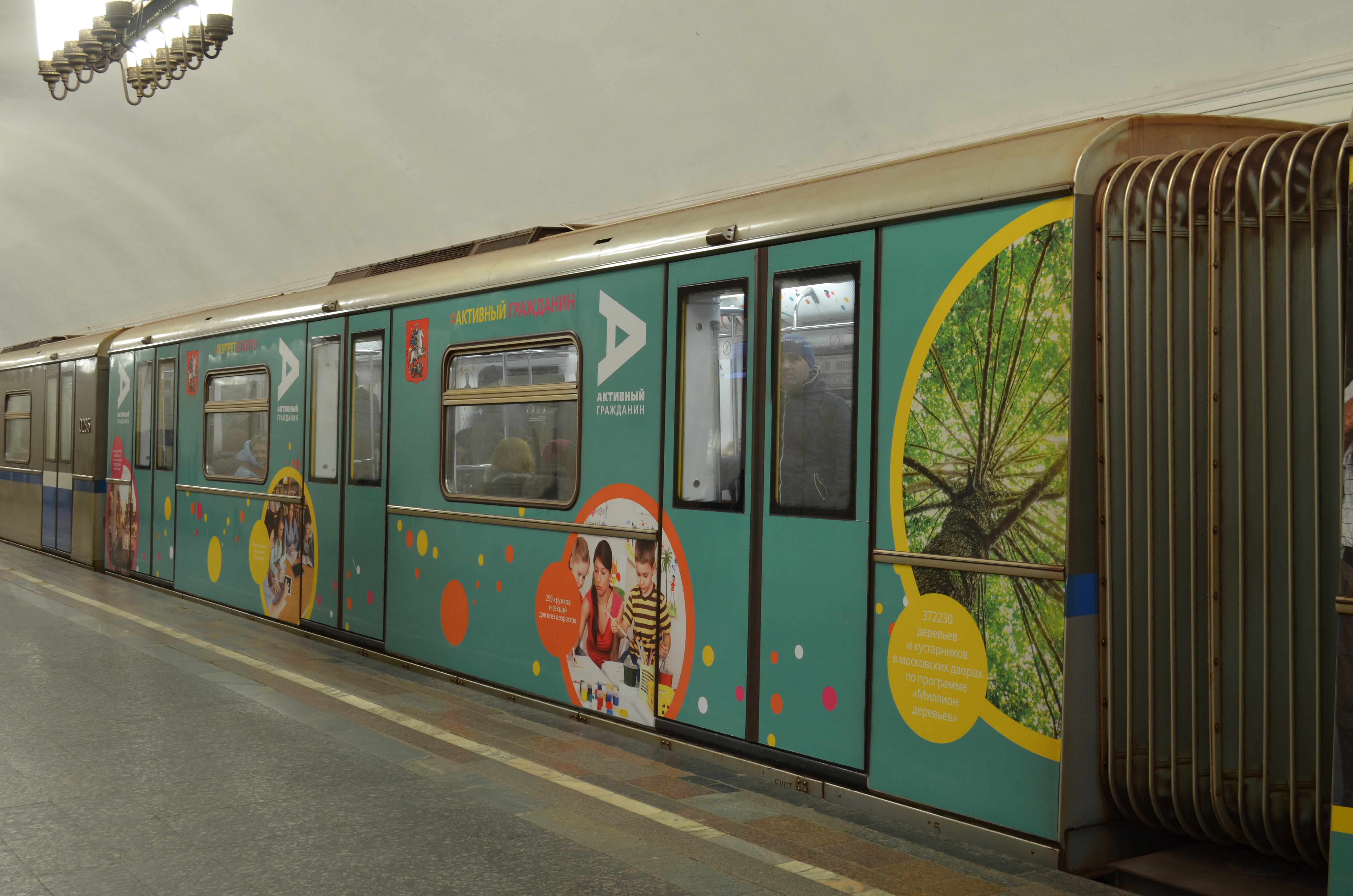 Вагон модели 81-740.4/741.4 «Русич» на Кольцевой линии с наклейкой «Активный гражданин» на станции «Курская»